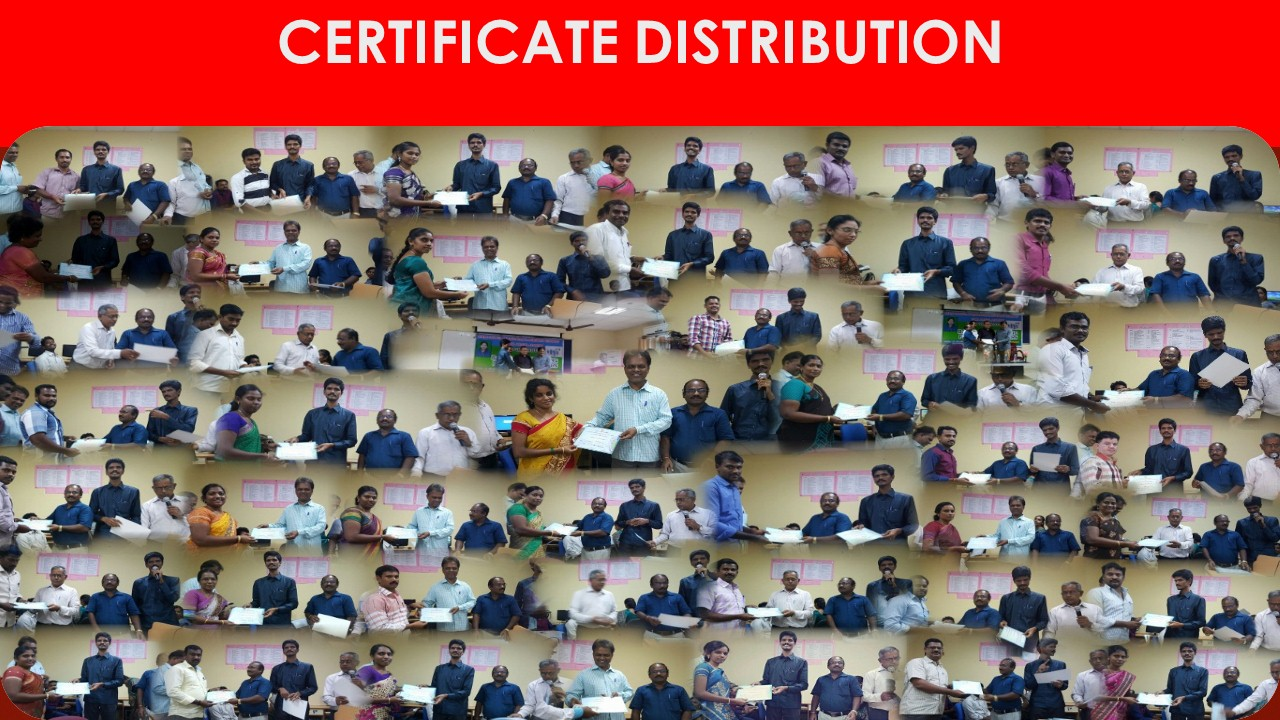 போட்டோ கொலாஜ்